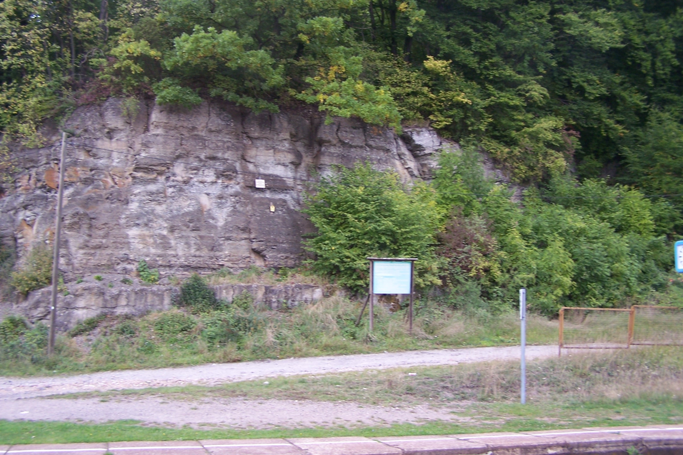 Beim Bau wurde auch eine Felsbpartie am Bahnhof abgetragen, hier entstand ein "Geologisches Schaufenster", es steht als Geotop unter Naturschutz und befindet sich auf der westlichen Seite vom "Bahnhof Förtha".